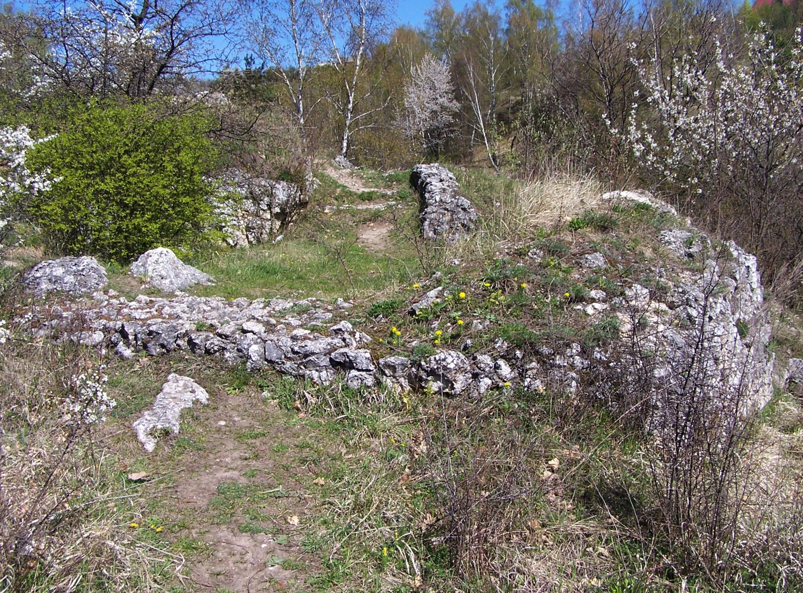 Dolina Kluczwody (Zamkowa Skała)